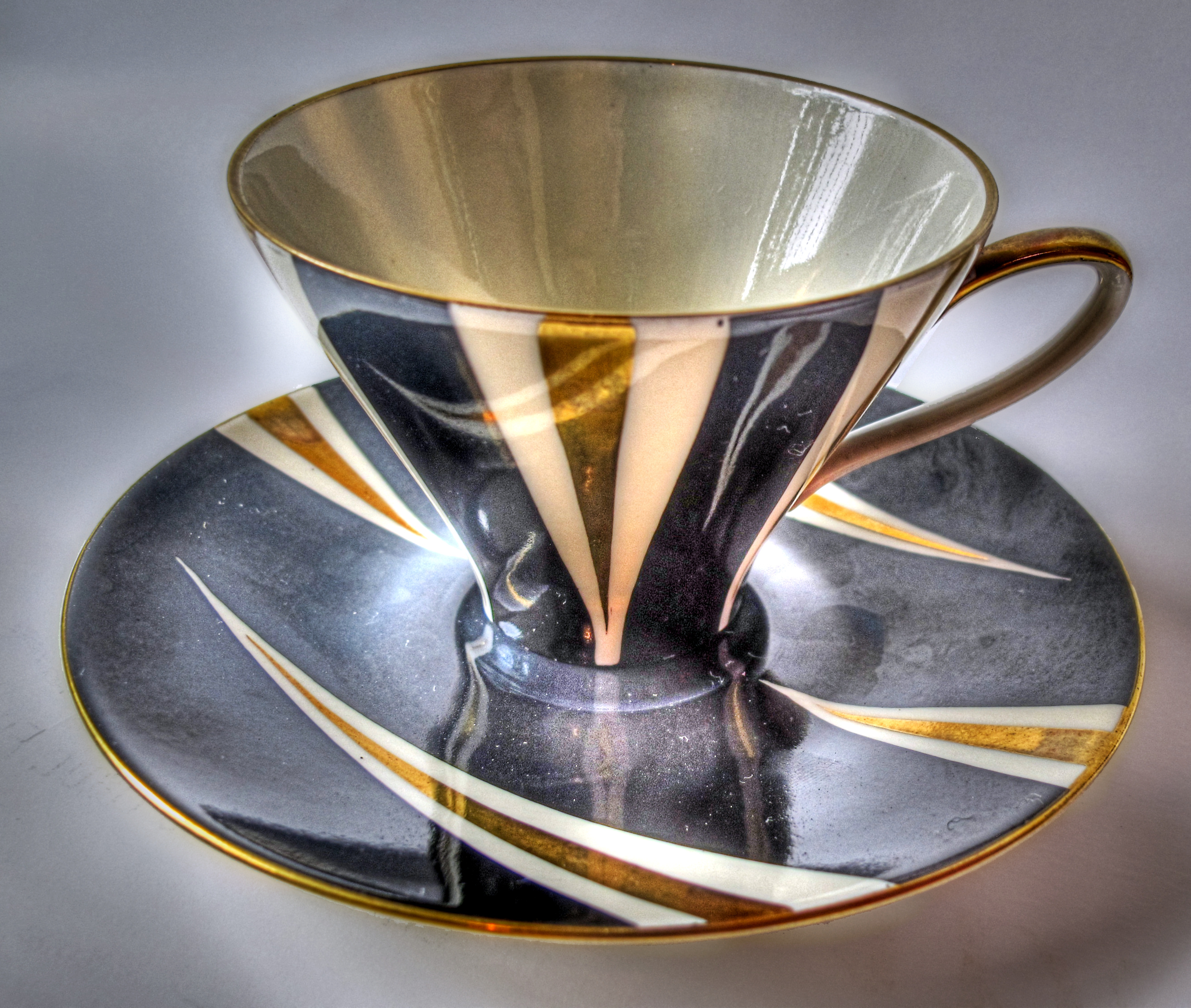 Mocca- bzw. Espressotasse der Porzellanmanufaktur Johann Seltmann Vohenstrauß Mitte der 1950er Jahre